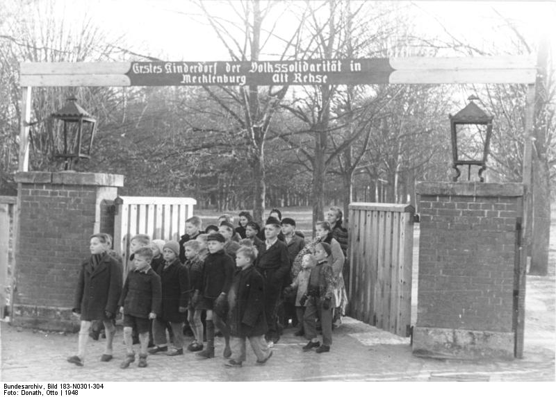 ADN-ZB/Donath Kinderdorf der Volkssolidarität in Alt-Rehse/Mecklenburg Sechzig heimat- und elternlose Kinder fanden hier ein Zuhause. Jede "Familie" umfaßt 10 Kinder im Alter von vier bis vierzehn Jahren. Alleinstehde Frauen zwischen fünfundreißig und fünfzig, die zum Teil selbst Kinder haben, nehmen die kleinen Waisen als "Muttis" in ihre Obhut. UBz.: Eingang zum Kinderdorf Aufn. 1948